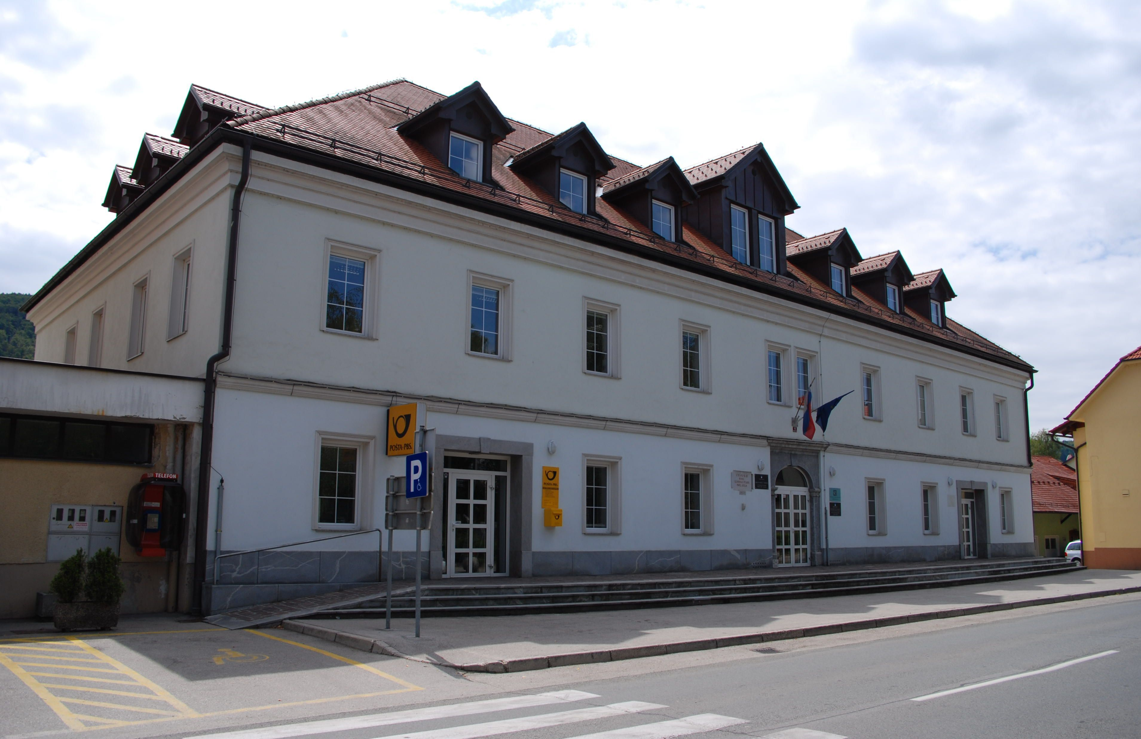 Rojstna hiša pesnika in dramatika Pavla Golie (1887-1959).